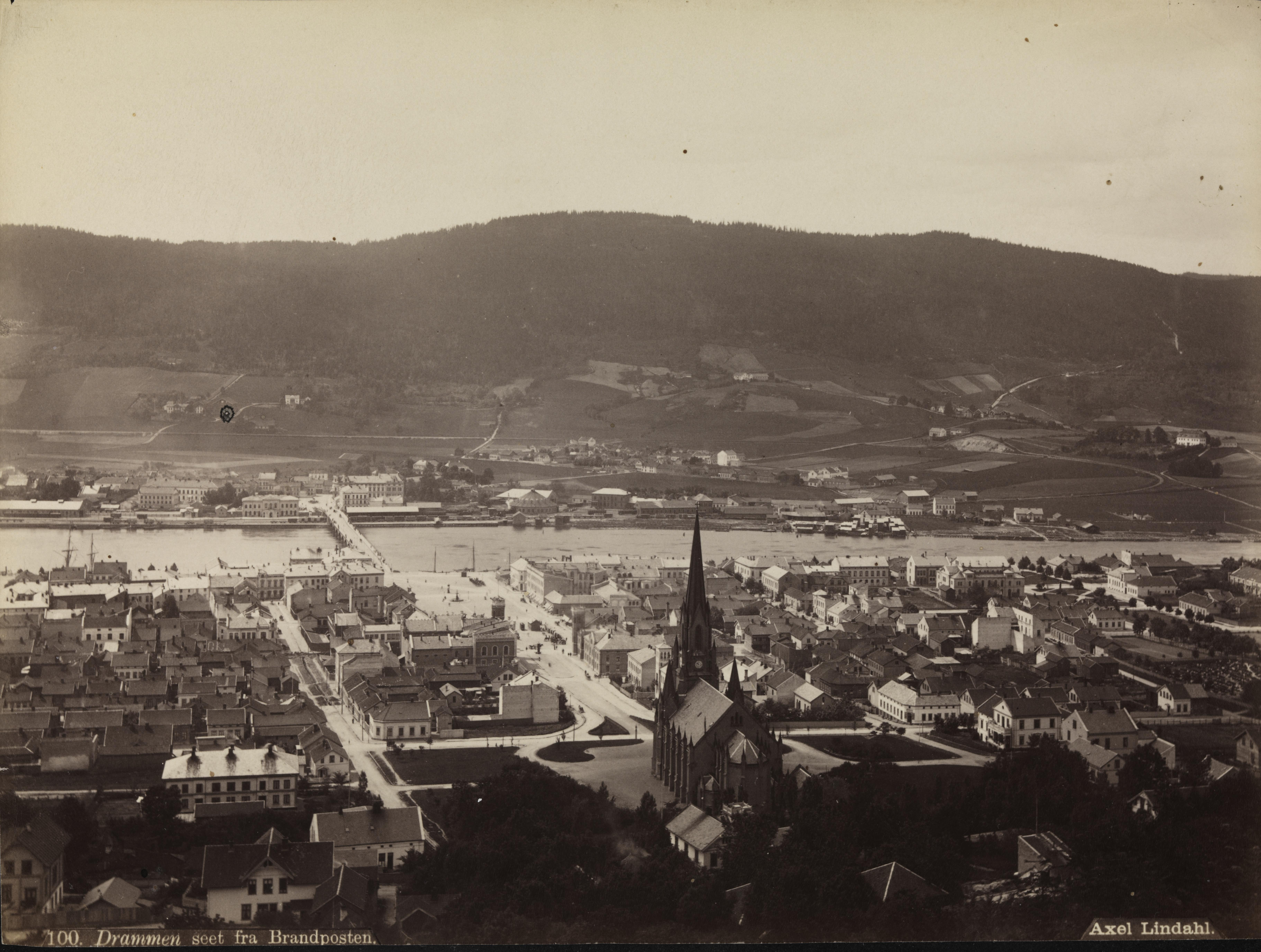 Drammen seet fra Brandposten Sted: Kommune: Fylke: Tagger: kirker bylandskap